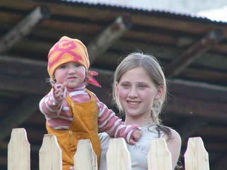 Girl from Armenia